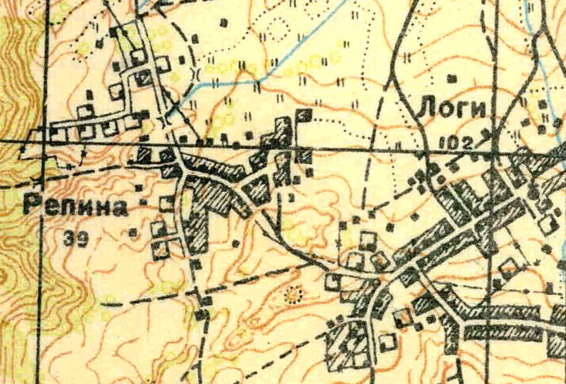 Топографическая карта Ленинградской области, квадрат О-35-9-Г-б (Вистина), деревня Логи